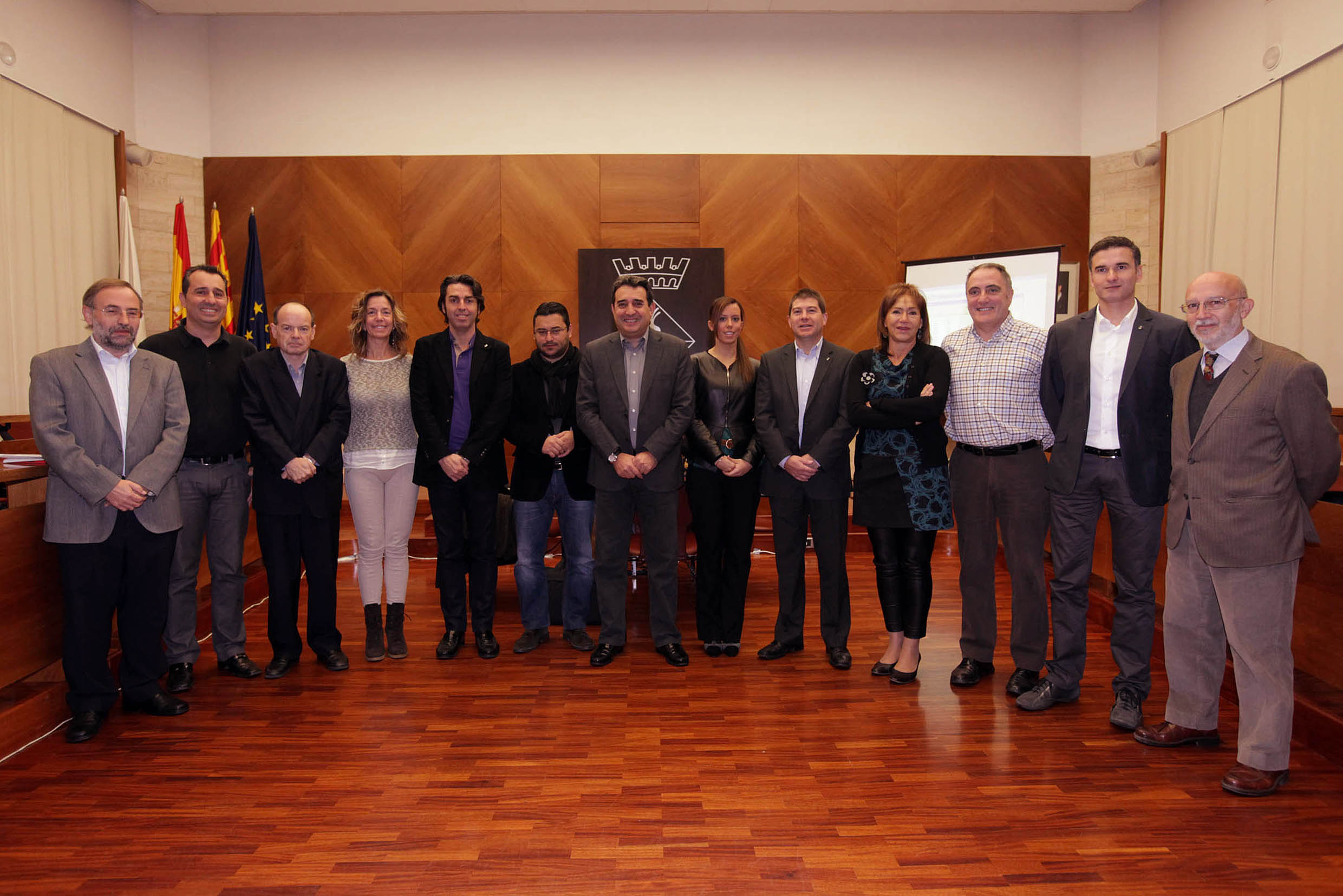 Nou equip de govern de l'Ajuntament de Sabadell amb el nou regidor de comerç Carles Bosch